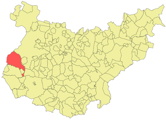 Situación del término municipal de Olivenza respecto a la provincia de Badajoz, en España.